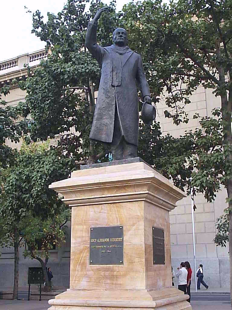 Estatua del presidente (1958-1964) Jorge Alessandri, obra de Francisca Cerda emplazada en la plaza de la Constitución, en Santiago de Chile. Autor:Alstradiaan Alstradiaan Blog Fecha:Abril de 2005 Fotografía tomada con una cámara digital Olympus camedia D-395 de 3.2 megapixeles